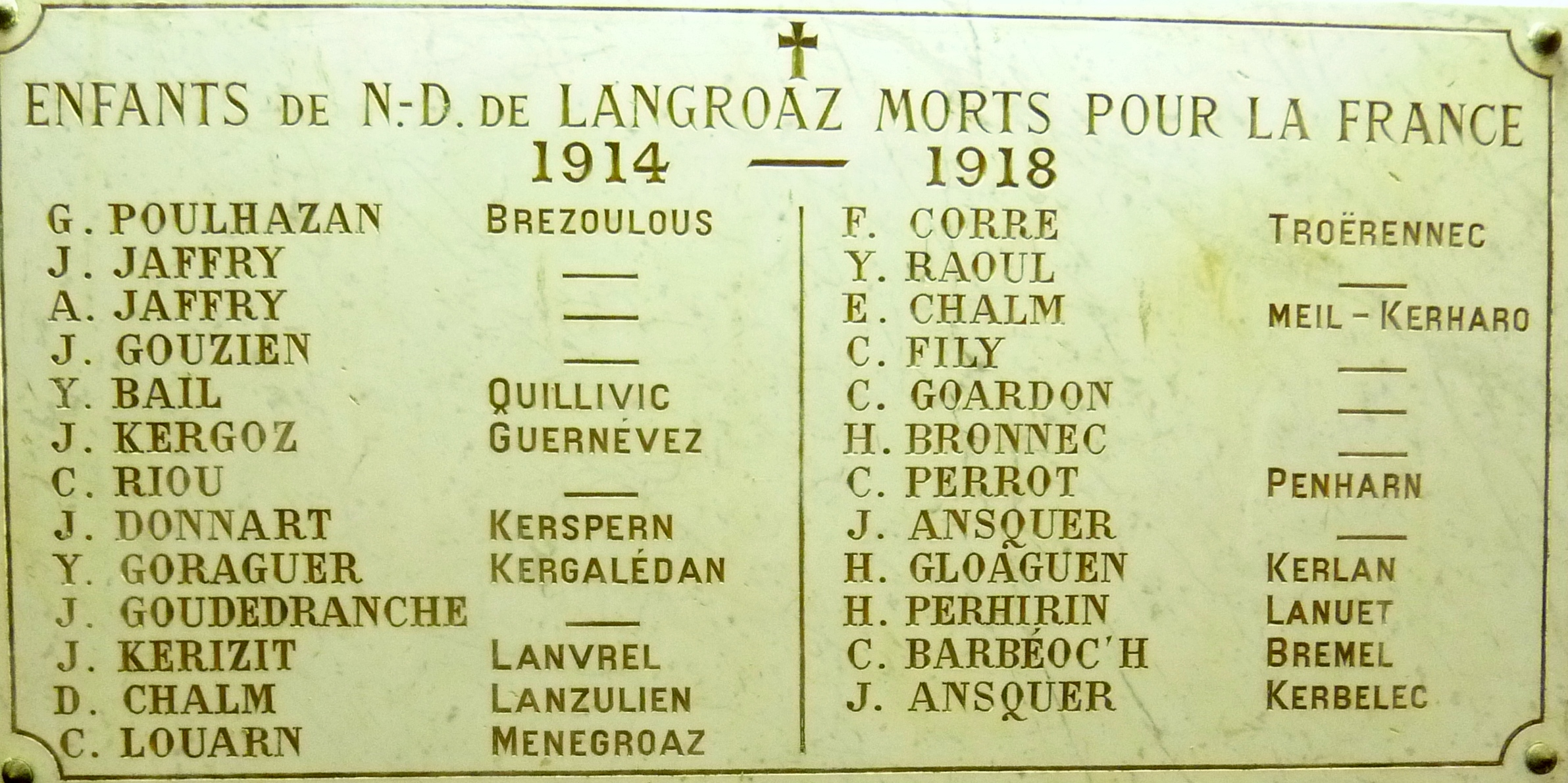 Plaque commémorative des morts pour la France pendant la Première Guerre mondiale placée dans la chapelle Notre-Dame de Langroas à Cléden-Cap-Sizun.